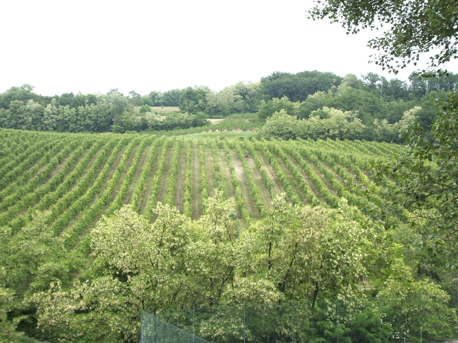 Un paio di nostre foto dalla Val Curone Val Curone - filari di frutteti